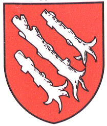 Wappen von Cerniaz Kanton Waadt Schweiz